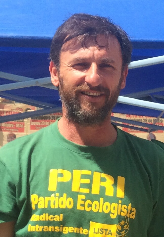 César Vega ingeniero agrónomo, locutor y político uruguayo.